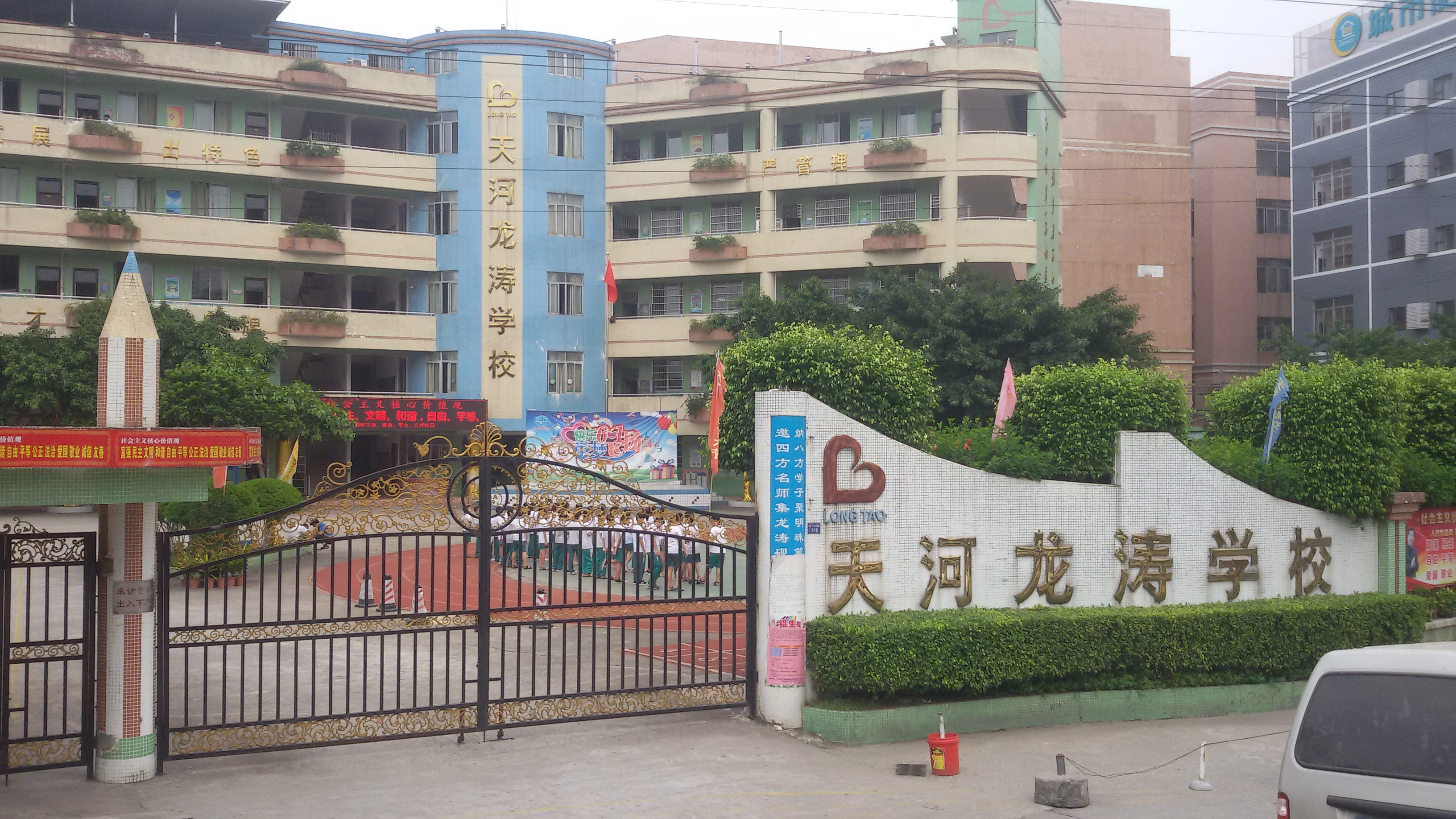 粵語: 天河龙涛学校